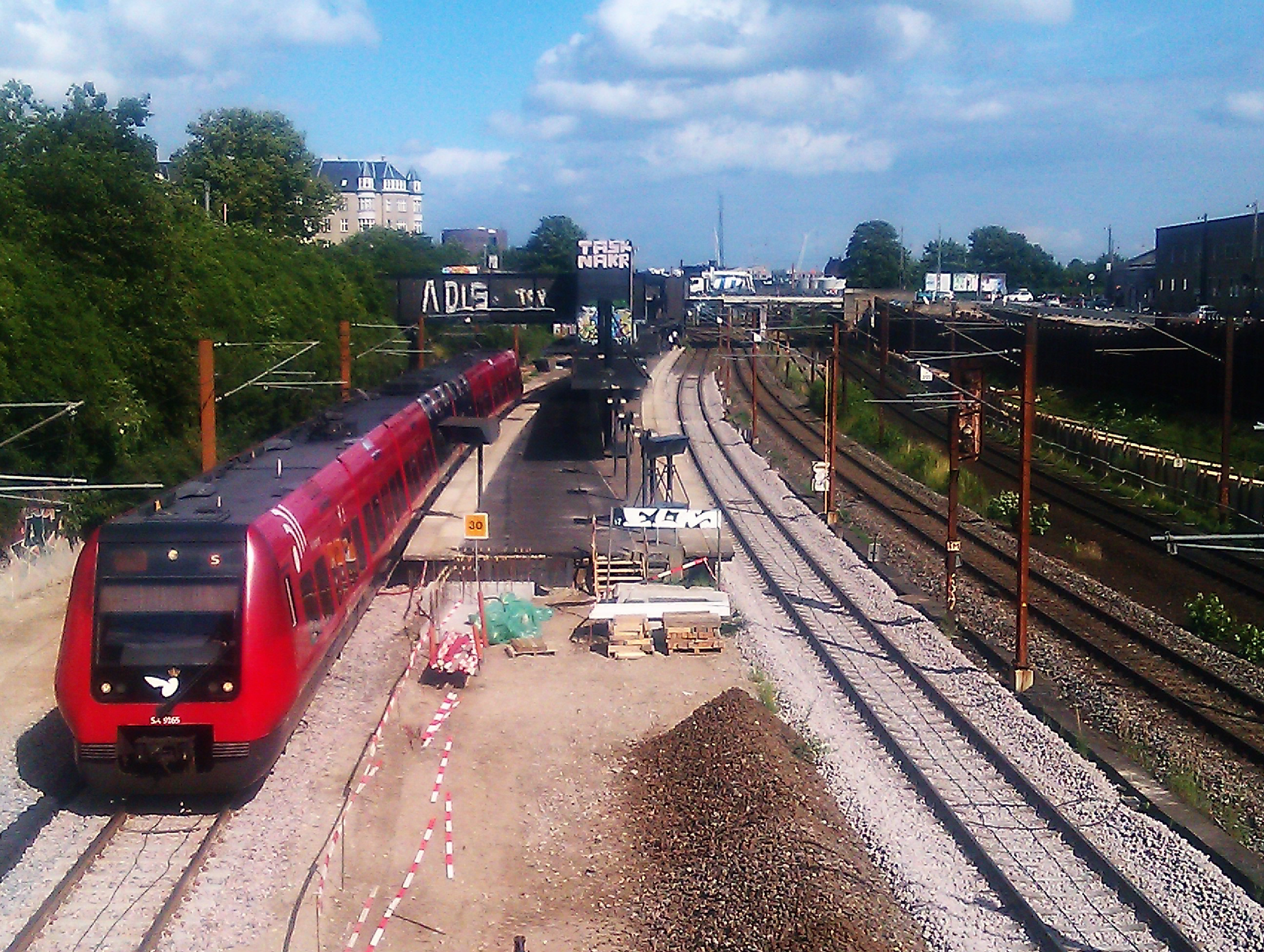 Enghave Station ser fra Vesterfælledvej, Vesterbro, København